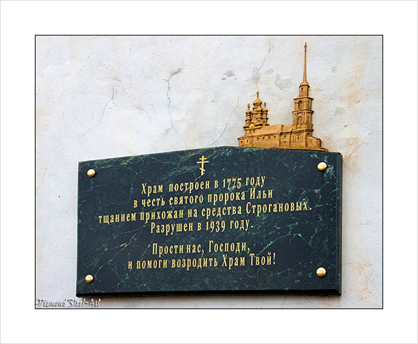 1775 год